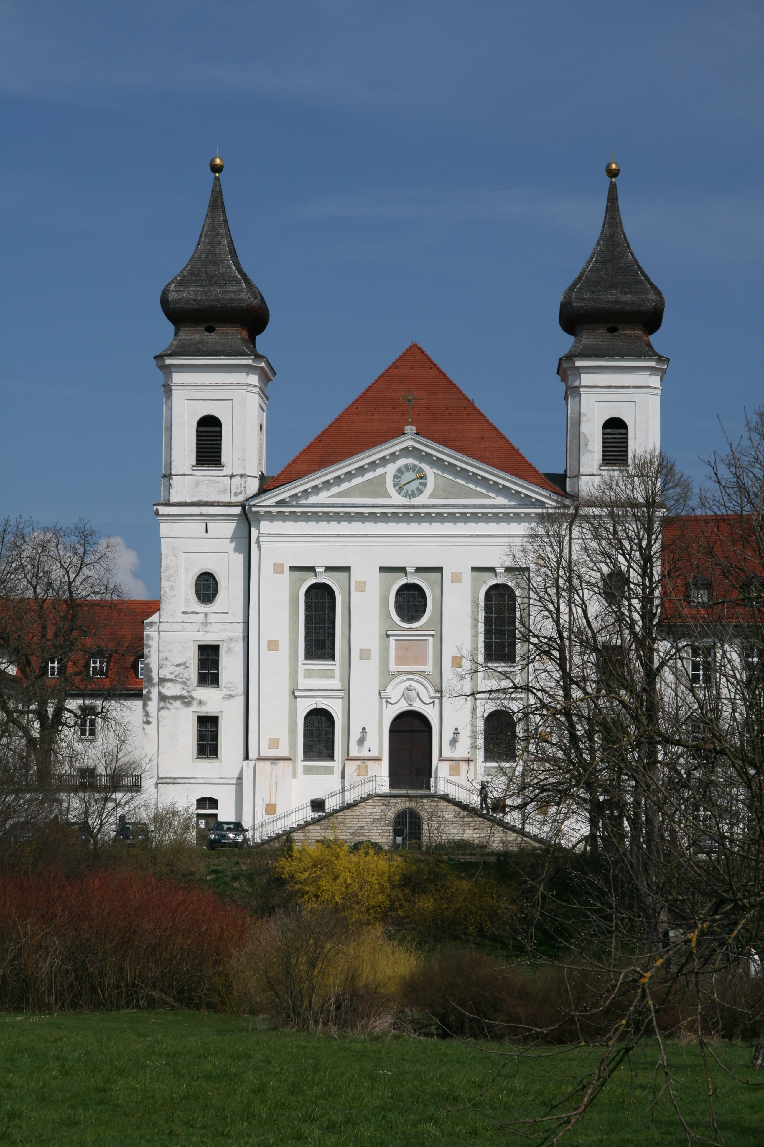 Kloster Schlehdorf